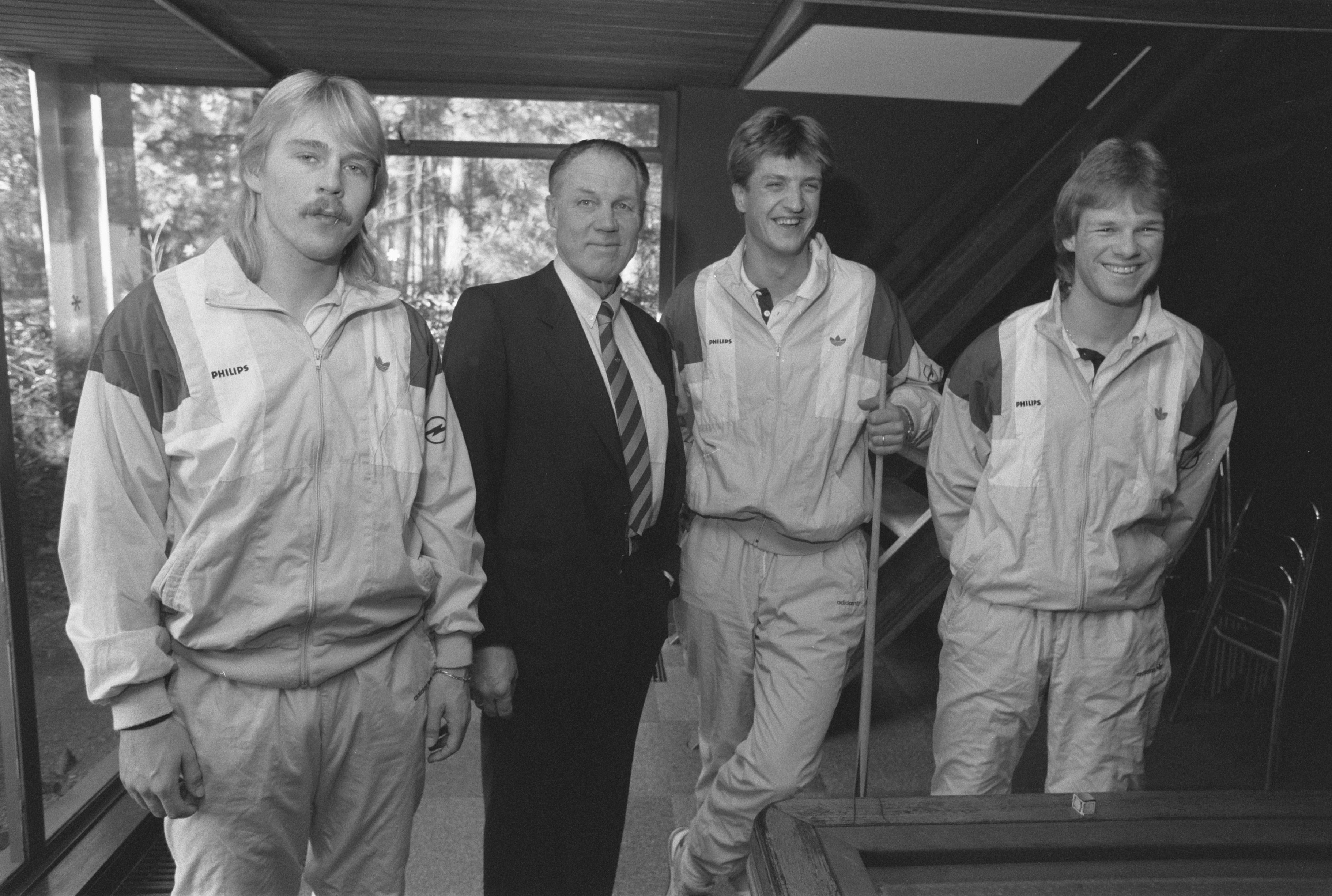 Collectie / Archief : Fotocollectie Anefo Reportage / Serie : [ onbekend ] Beschrijving : Selectie Nederlands elftal in Zeist in verband met interland tegen Cyprus; debutant Lankhaar, Michels, Kieft en Erwin Koeman Datum : 4 december 1987 Locatie : Utrecht, Zeist Trefwoorden : sport, voetbal Persoonsnaam : Erwin Koeman, Kieft, Lankhaar Fotograaf : Bogaerts, Rob / Anefo Auteursrechthebbende : Nationaal Archief Materiaalsoort : Negatief (zwart/wit) Nummer archiefinventaris : bekijk toegang 2.24.01.05 Bestanddeelnummer : 934-1443